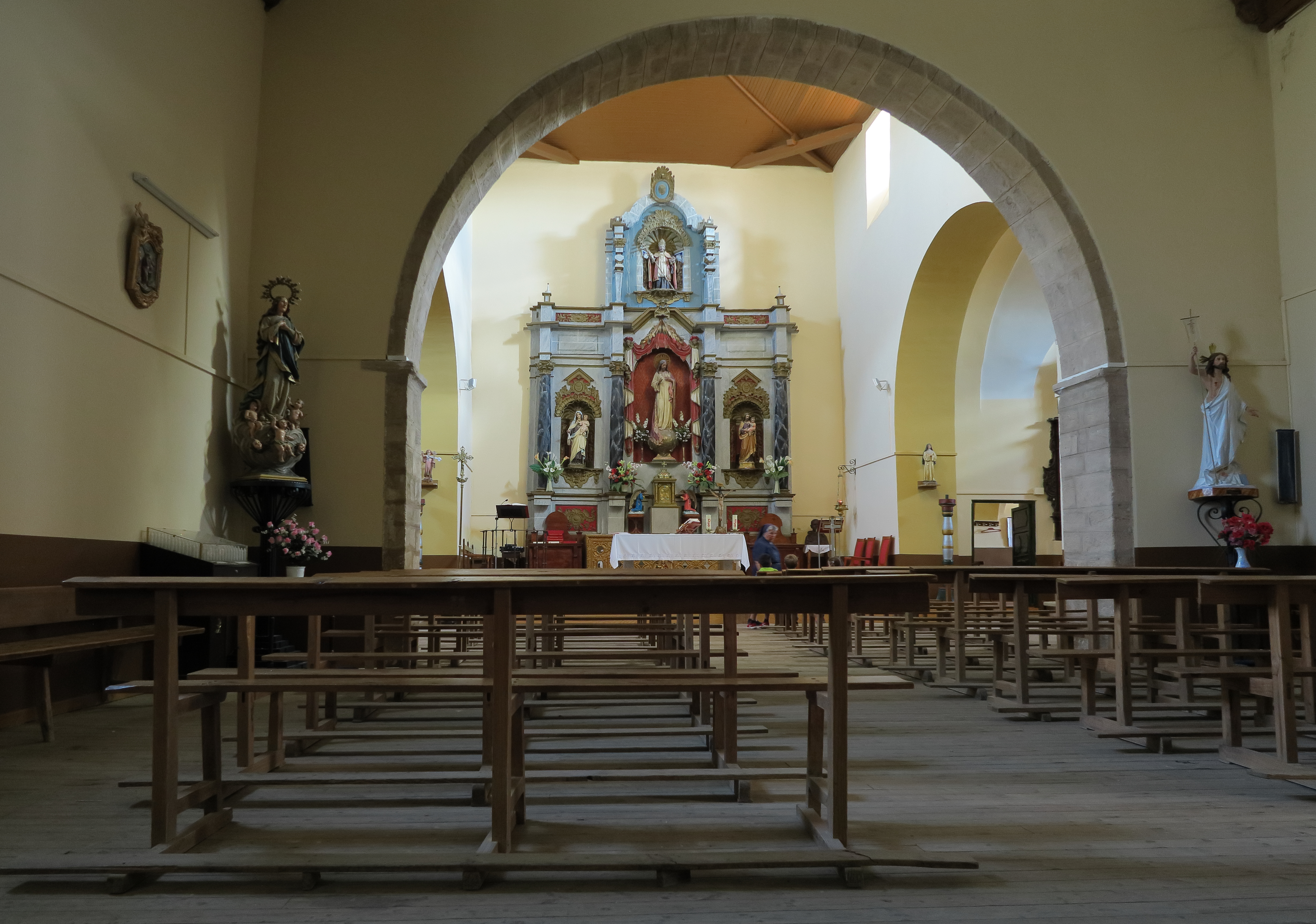 Pajares de la Lampreana, Iglesia de San Pedro, interior, 01